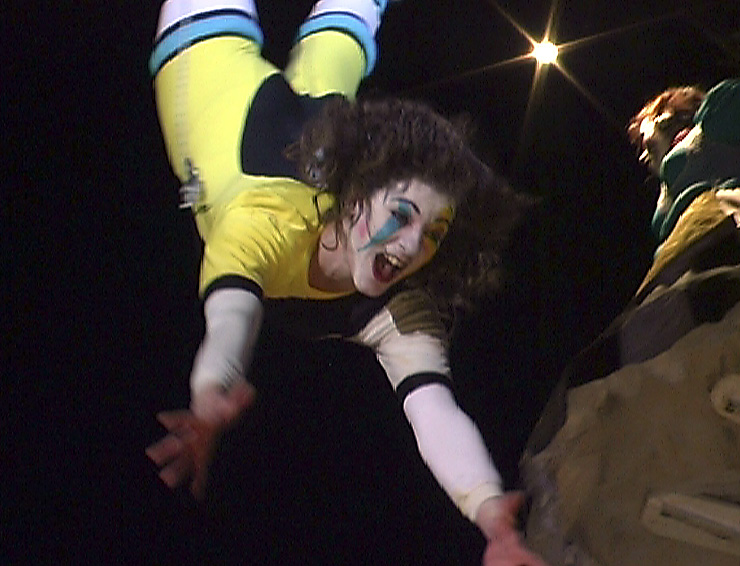 Internationale Kulturtage der Stadt Dortmund 2000, Transe Express: „Lâcher de Violons“ (Straßentheater)